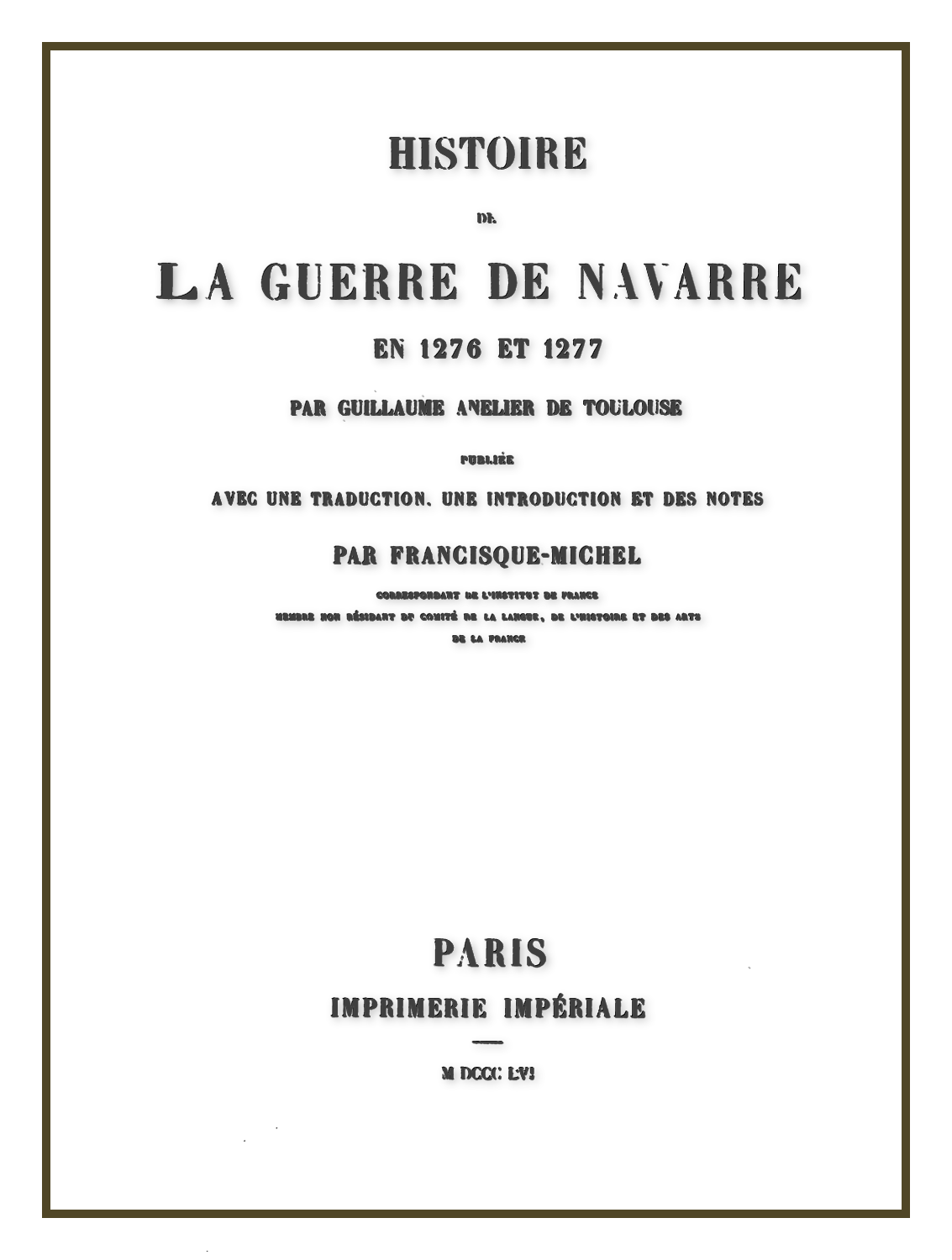 Histoire de la Guerre de Navarre en 1276 et 1277 - portada recreada